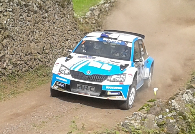 Ricardo Moura ao volante de um Škoda Fabia R5, na SS4 - Pico da Pedra - Golfe - 1, durante o Azores Rallye 2019, no dia 22 de março de 2019.